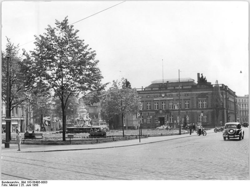 Görlitz, Platz der Befreiung, Brunnen Zentralbild Mielzer Quasch-Ho. 25.6.1958 Görlitz Der Platz der Befreiung mit dem Brunnen "Muschelminna". Im Hintergrund die Post.